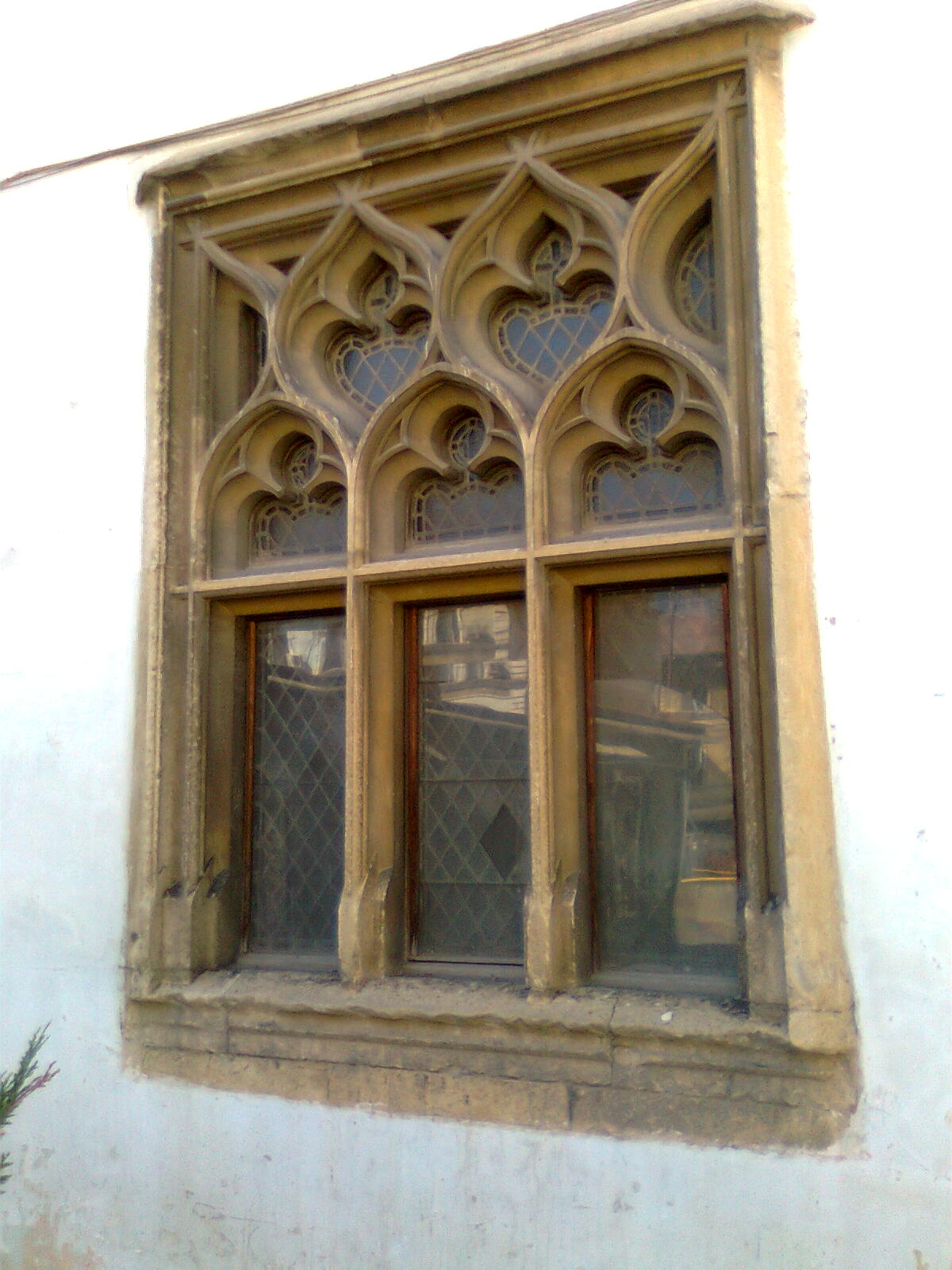 Kolozsvári ferences kolostor (volt zenelíceum) udvari ablaka